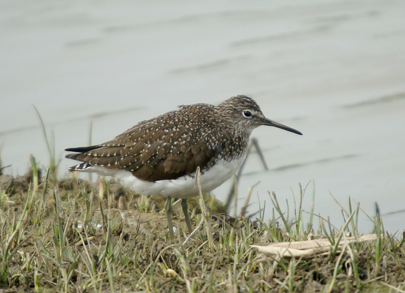 Andarrios grande - Green Sandpiper - Tringa ochropus, Delta Llobregat, Barcelona, Spain